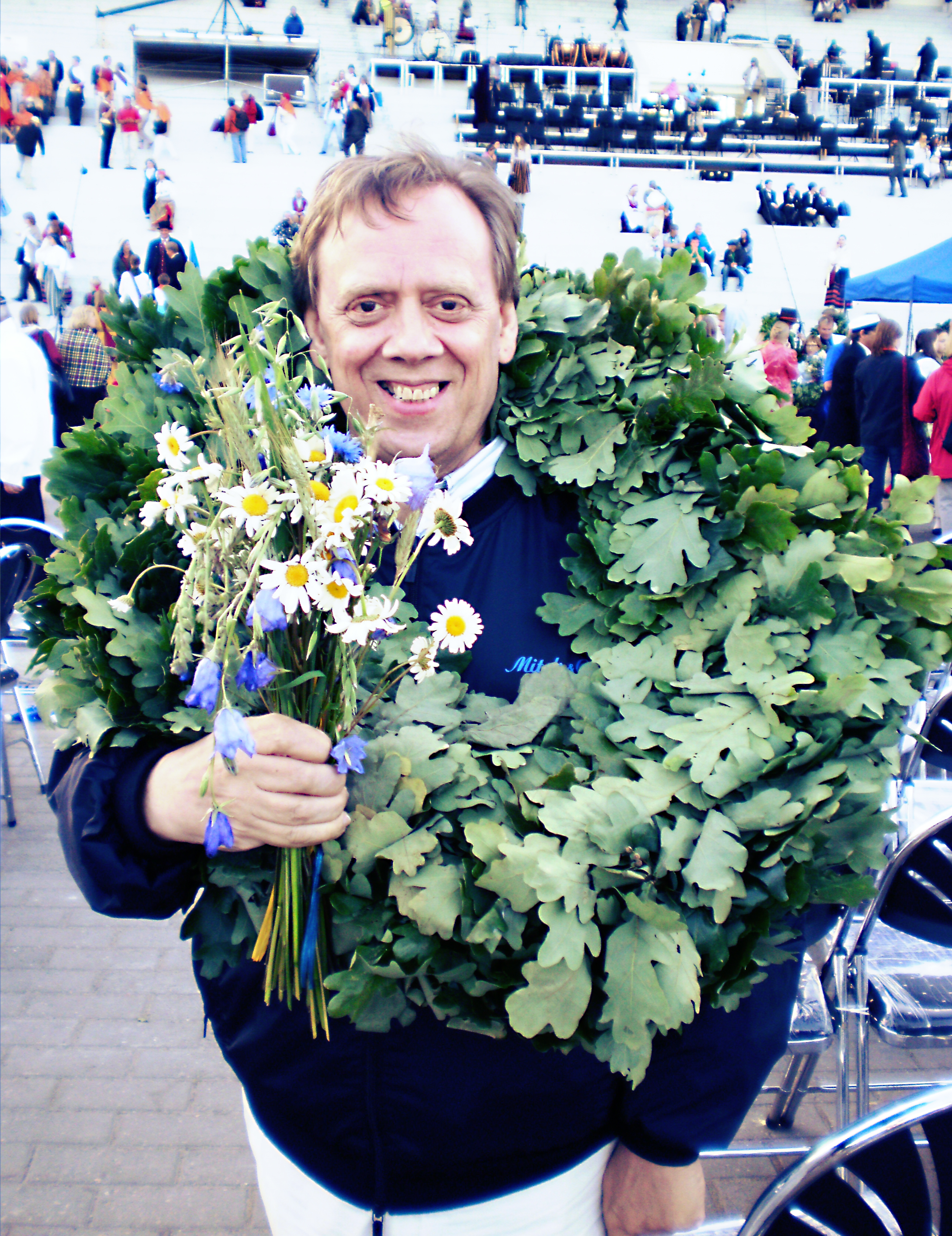 ooperilavastaja Hans Nieuwenhuis Eesti Laulupeol 2009. aastal